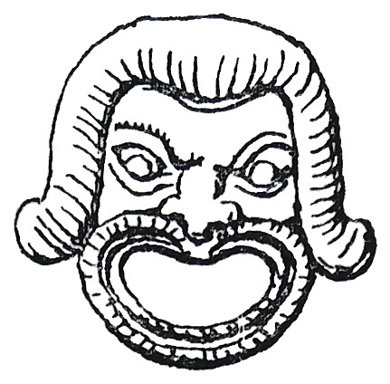 Citation de la légende accompagnant le dessin, dans André Steyert (1895), Nouvelle histoire de Lyon et des provinces, de lyonnais, Forez, Beaujolais, Franc-lyonnais et Dombes, t. 1 : Antiquité depuis les temps préhistoriques jusqu'à la chute du royaume burgonde (534), p. 343, fig. 406 : " Masque comique sur une lampe, trouvée dans les fouilles de Trion. D'après M. Dissart ( Trion, t. II, p. 521). On sait que les acteurs antiques avaient la figure couverte d'un masque aux traits exagérés et dont la bouche était ouverte démesurément. Dans ceux des tragiques les coins de la bouche étaient abaissés d'une manière douloureuse ; pour les comiques, ils étaient au contraire relevés comme par le rire ; mais le rire était plutôt une grimace. " A. Steyert cite (Allmer & Dissard 1888) Auguste Allmer et Paul Dissard, « Trion. Antiquités découvertes en 1885, 1886 et antérieurement au quartier de Lyon dit de Trion » (641 p.), Mémoires de l'Académie des sciences, belles-lettres et arts de Lyon. Classe des lettres. XXV, 2e partie, t. 2, 1888, p. 521, fig. 1510. Cette source précise que les masques en question, dont plusieurs exemplaires, portent la marque STROBILI (dont on sait maintenant qu'il avait son atelier du côté de Modène) ; et qu'ils sont faits d'argile rouge ou grise à couverte jaune brun. La légende accompagnant ce dessin renvoie aussi à la notice de la fig. 1460 (p. 513), qui est une note sur les variantes de la marque Strobili : "Argile rouge, jaune ou grise. - Plusieurs variétés. - Même marque à Bois-le-Duc, Bregentz, Laibach, Liège, Londres, à Magreta, dans le Modenais où était peut-être la fabrique, à Munich, Orange, Paris, Pesth, Pompéi, Rome, Rosenauberg, Tongres, Vaison, Vérone et Vienne. - STROBILOS, Naples ; - STROBILI F, Apt, Nimègue.